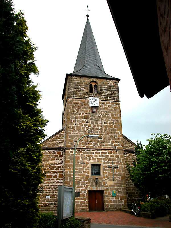 St. Urbanus. Katholische Kirche. Dorsten-Rhade.